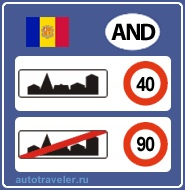 Générales